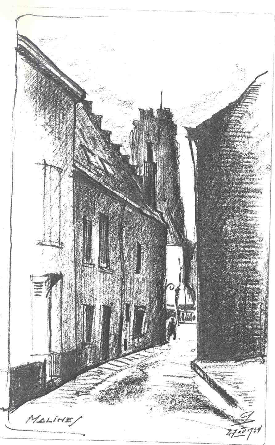 Malines (Mechelen), vue sur la Cathédrale Saint-Rombaud